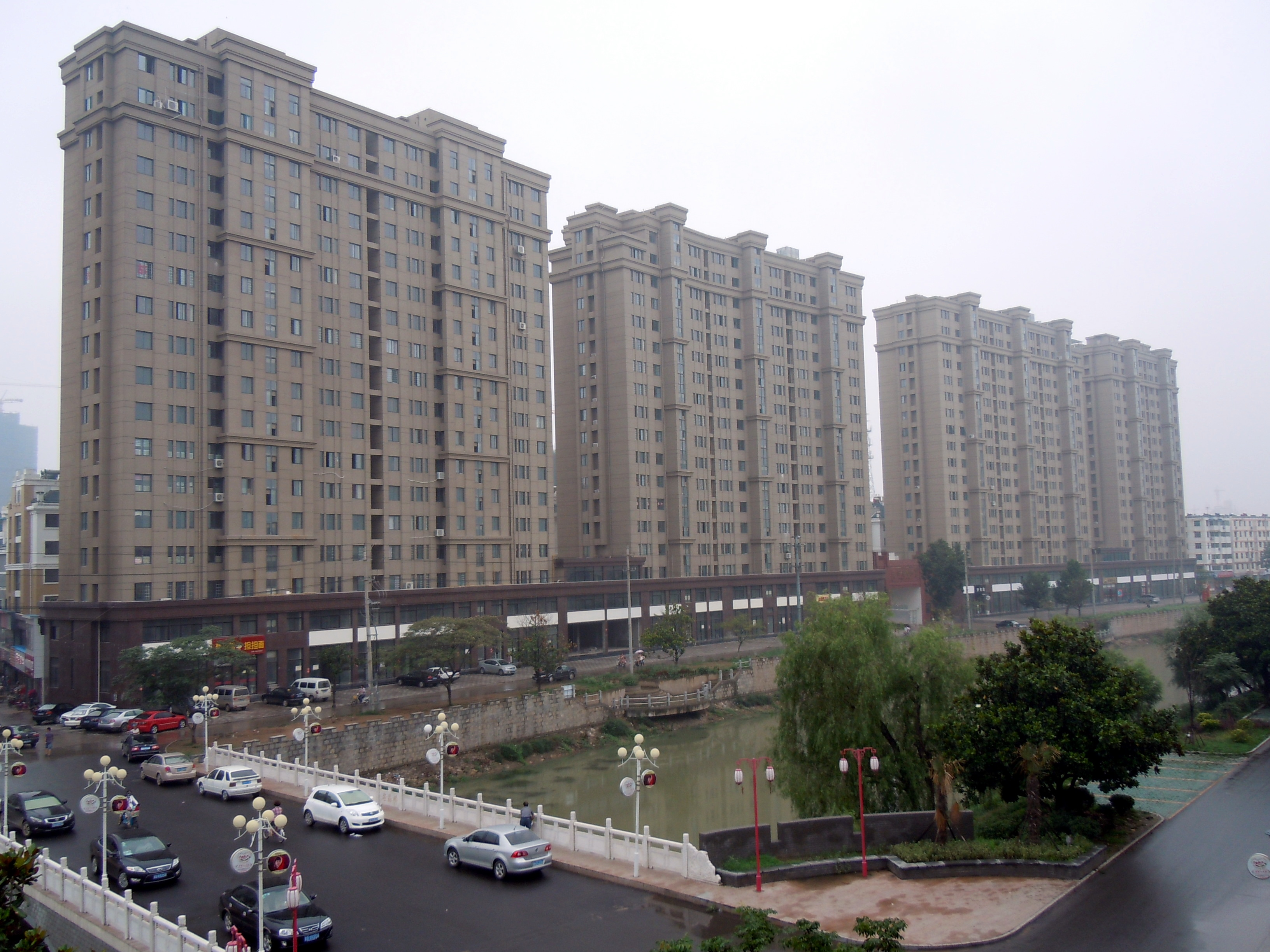 沭阳县老沭河滨河景观